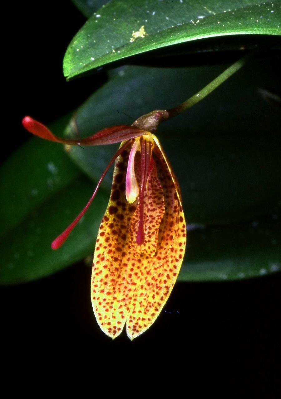 Restrepia elegans